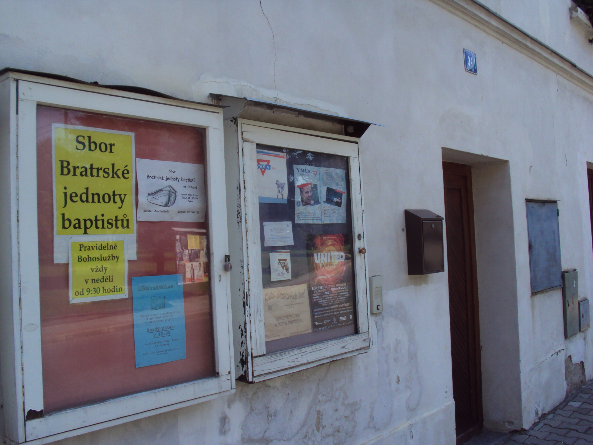 Vývěska Sboru bampistů a YMCA v Cvikově, ulice Československé armády 34